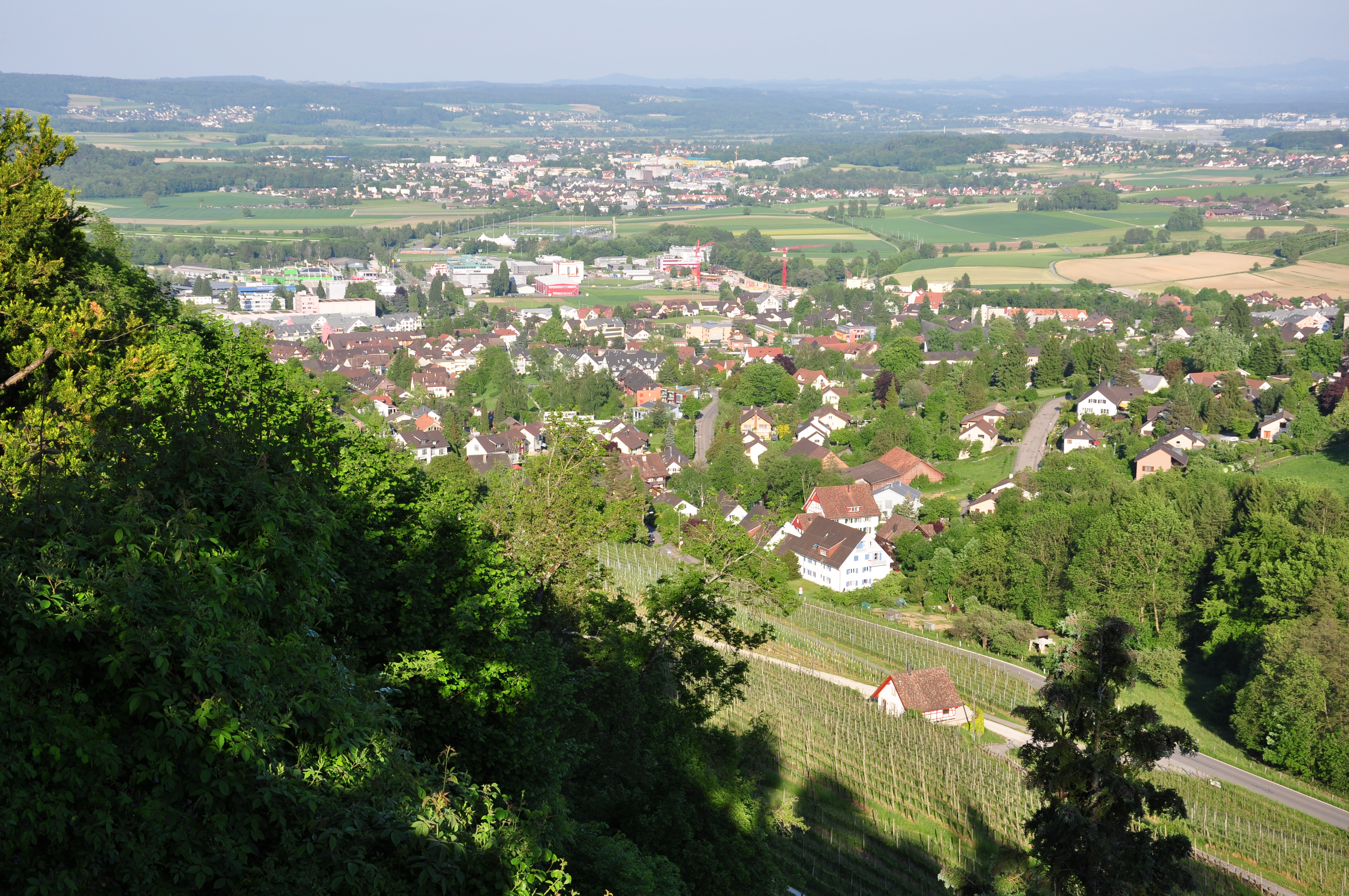 Dielsdorf as seen from Regensberg (Switzerland)